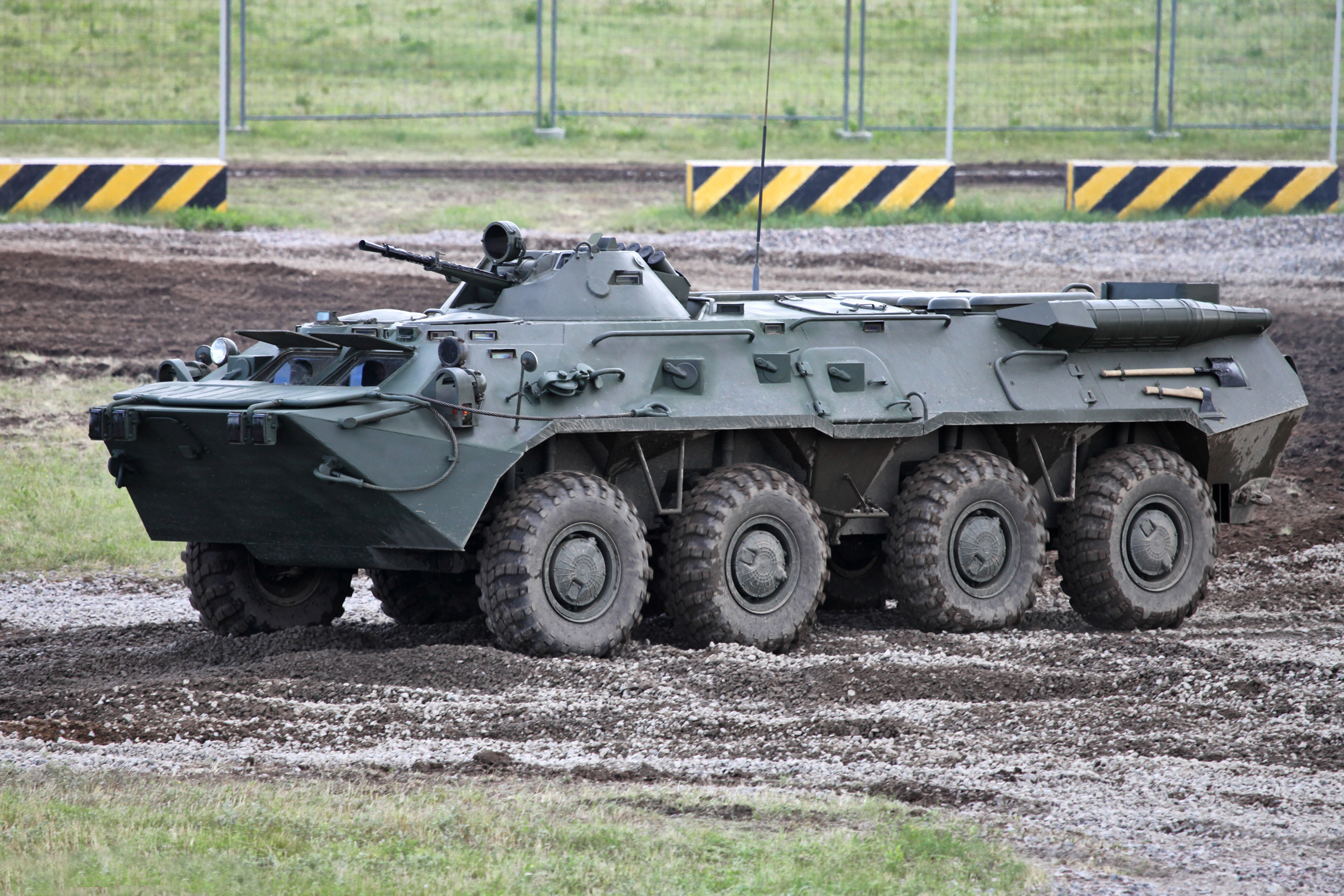 Бронетранспортер БТР-80 (BTR-80 APC)